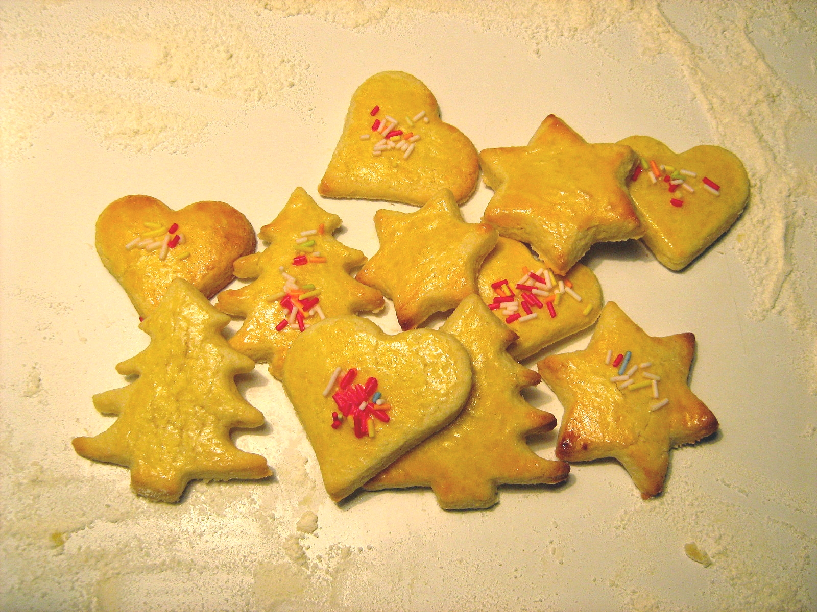 Weihnachtsplätzchen aus Mürbeteig